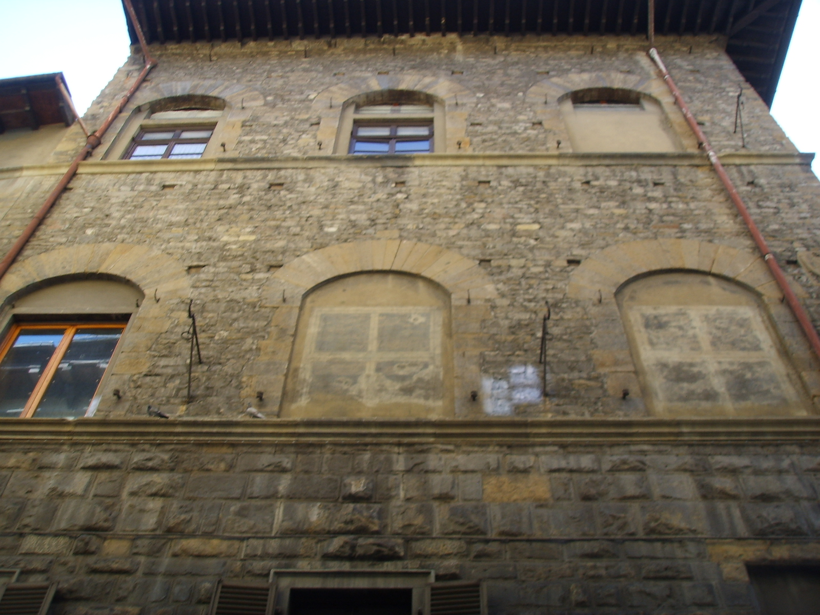 Palazzo del bembo, view